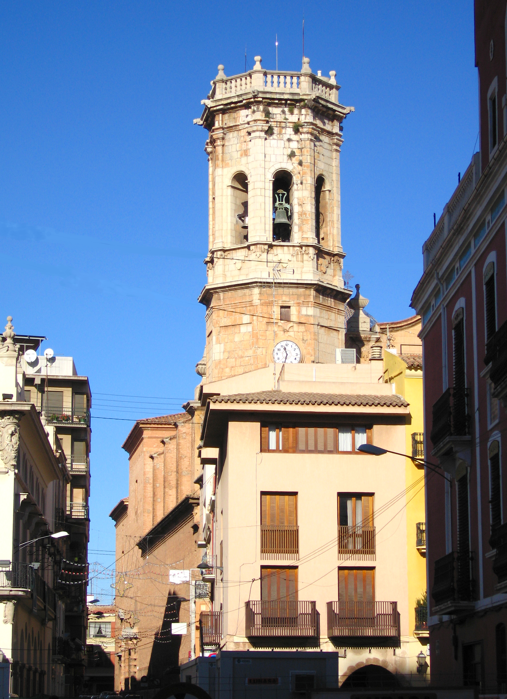 Campanario de San Jaime de Vila-real